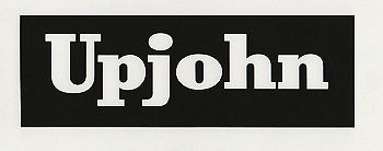 Il logo Upjohn nel 1961